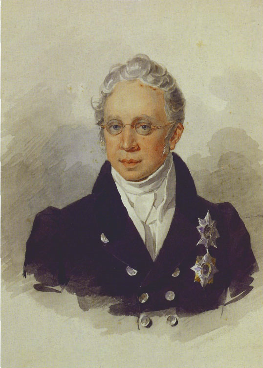 Соколов Петр Федорович. Портрет Портрет И.М. Муравьёва-Апостола. Портрет графа К.В. Нессельроде. Музей Тропинина. Ранее считался портретом И.М. Муравьева-Апостола. Также есть версия, что он изображает Г.А. Строганова (1770-1857)